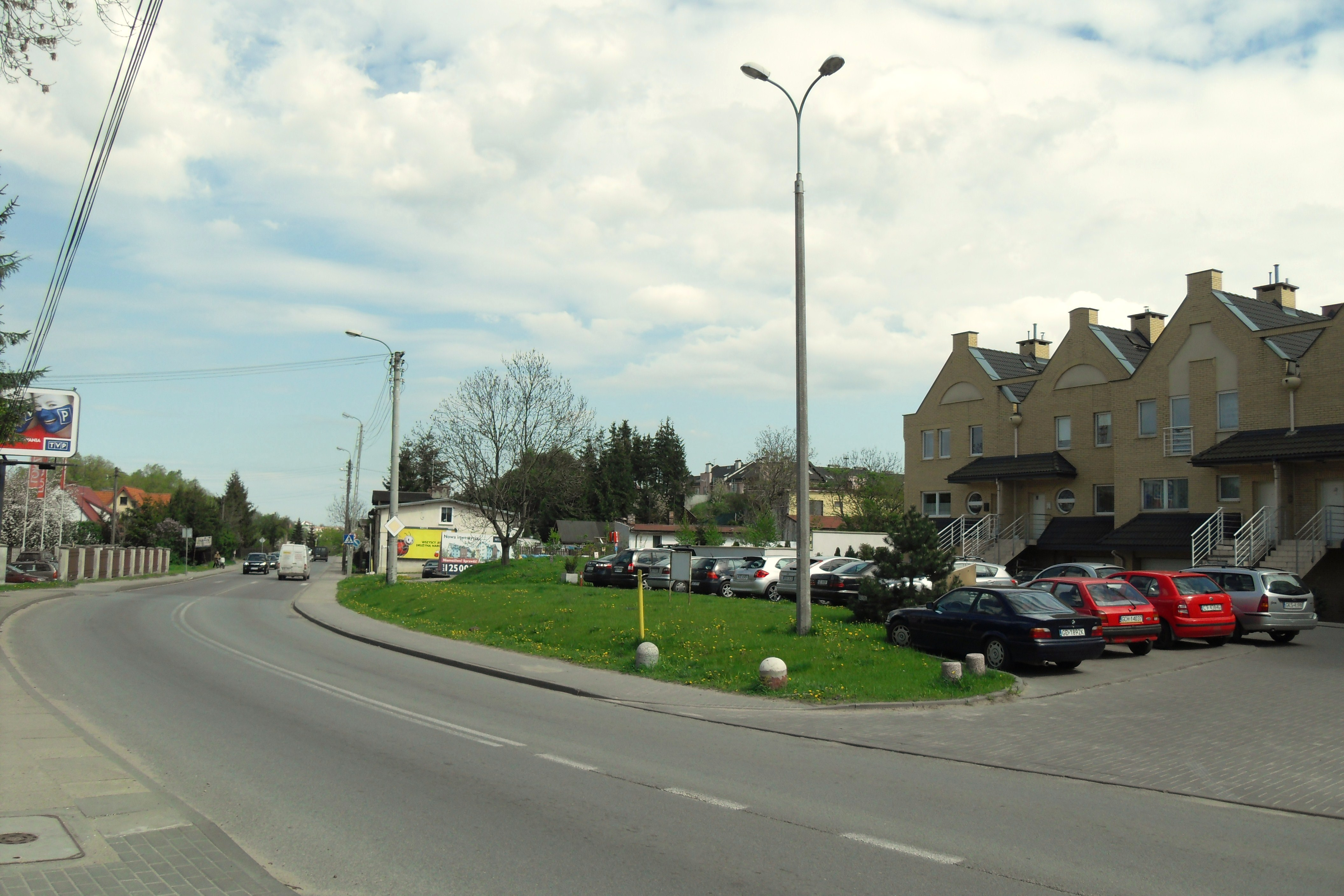 Gdańsk Pieklisko, ul. Kartuska.